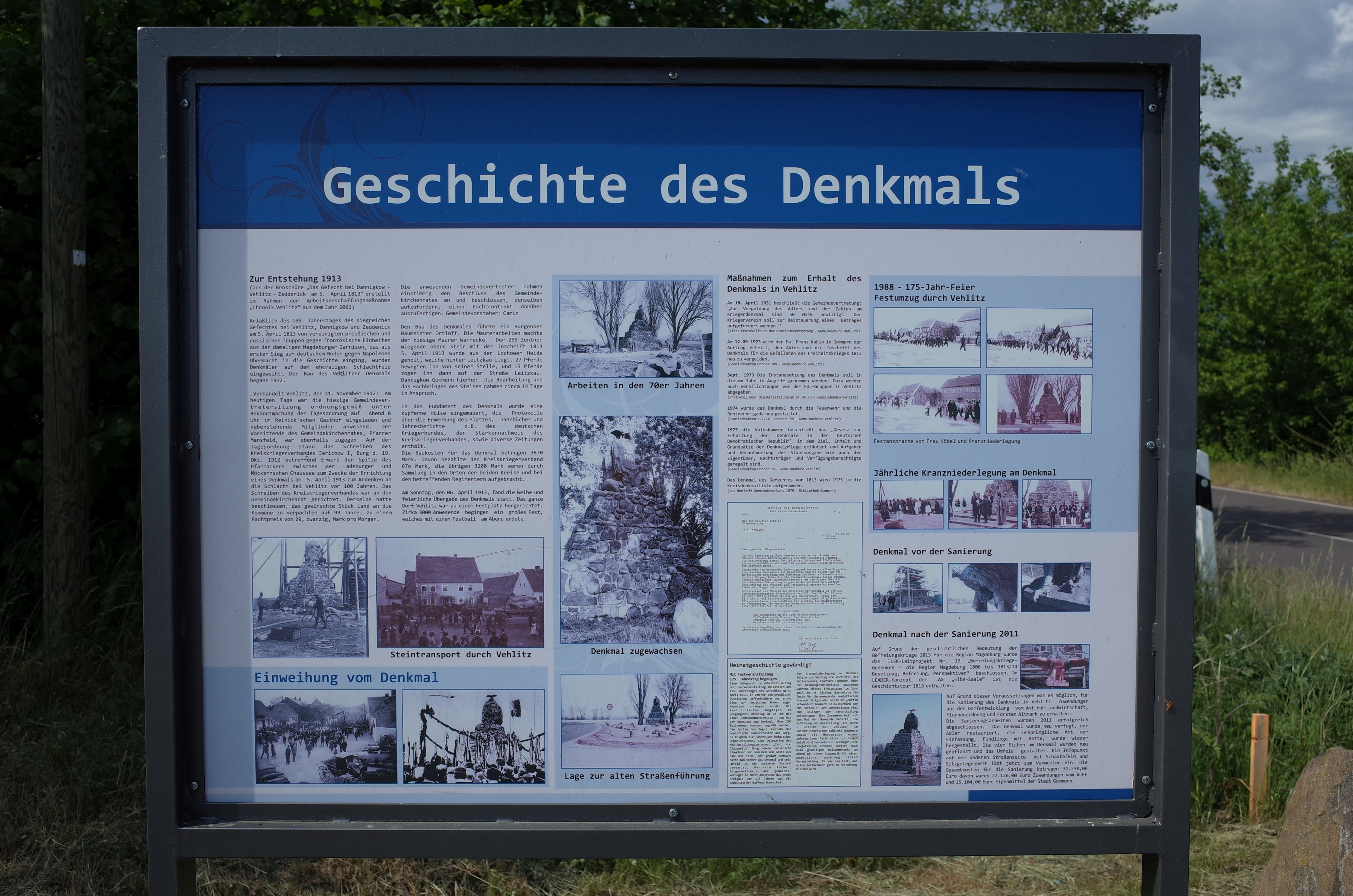 Gommern, Informationstafel am Denkmal im Ortsteil Vehlitz